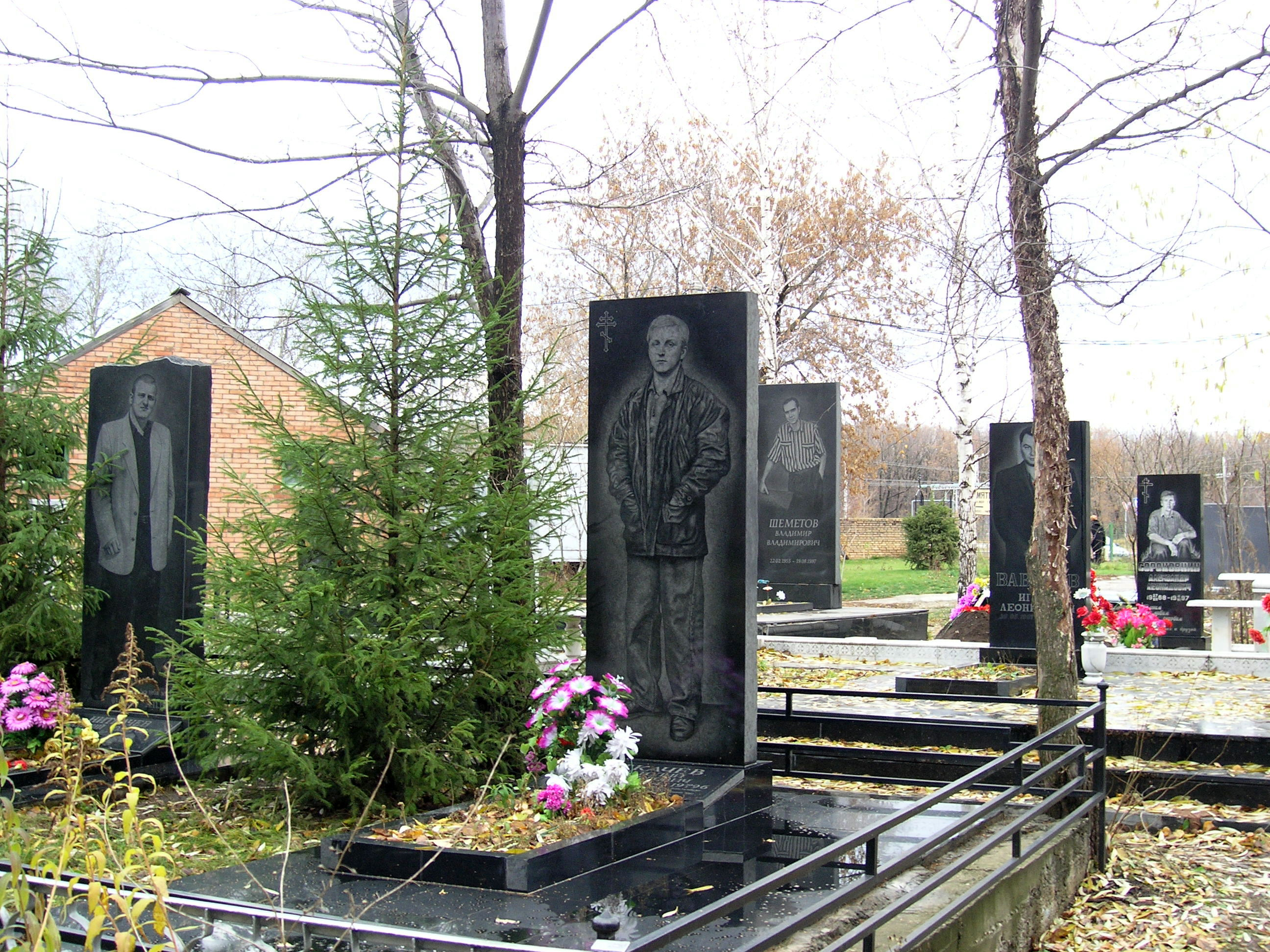 Могилы на "Аллее Героев". Баныкинское кладбище, Тольятти, Россия